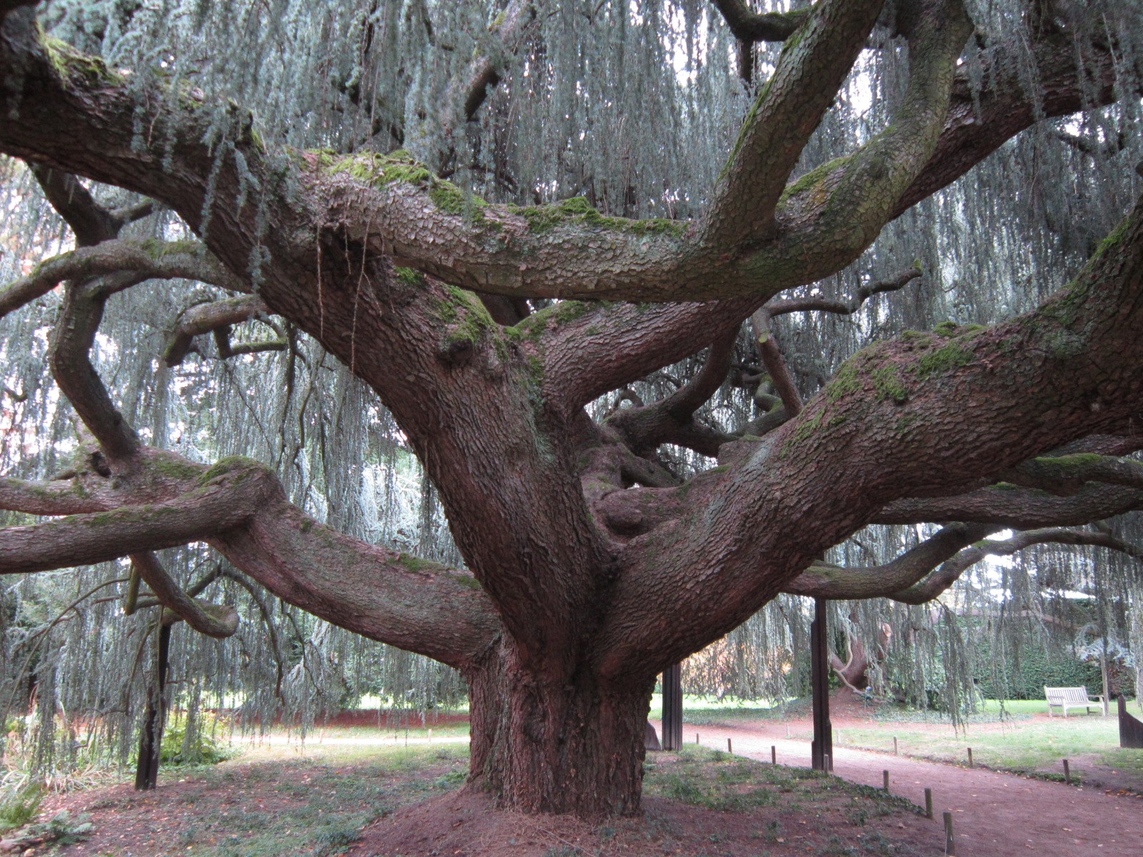 Cèdre de l'arboretum de Châtenay-Malabry (Hauts-de-Seine, France).